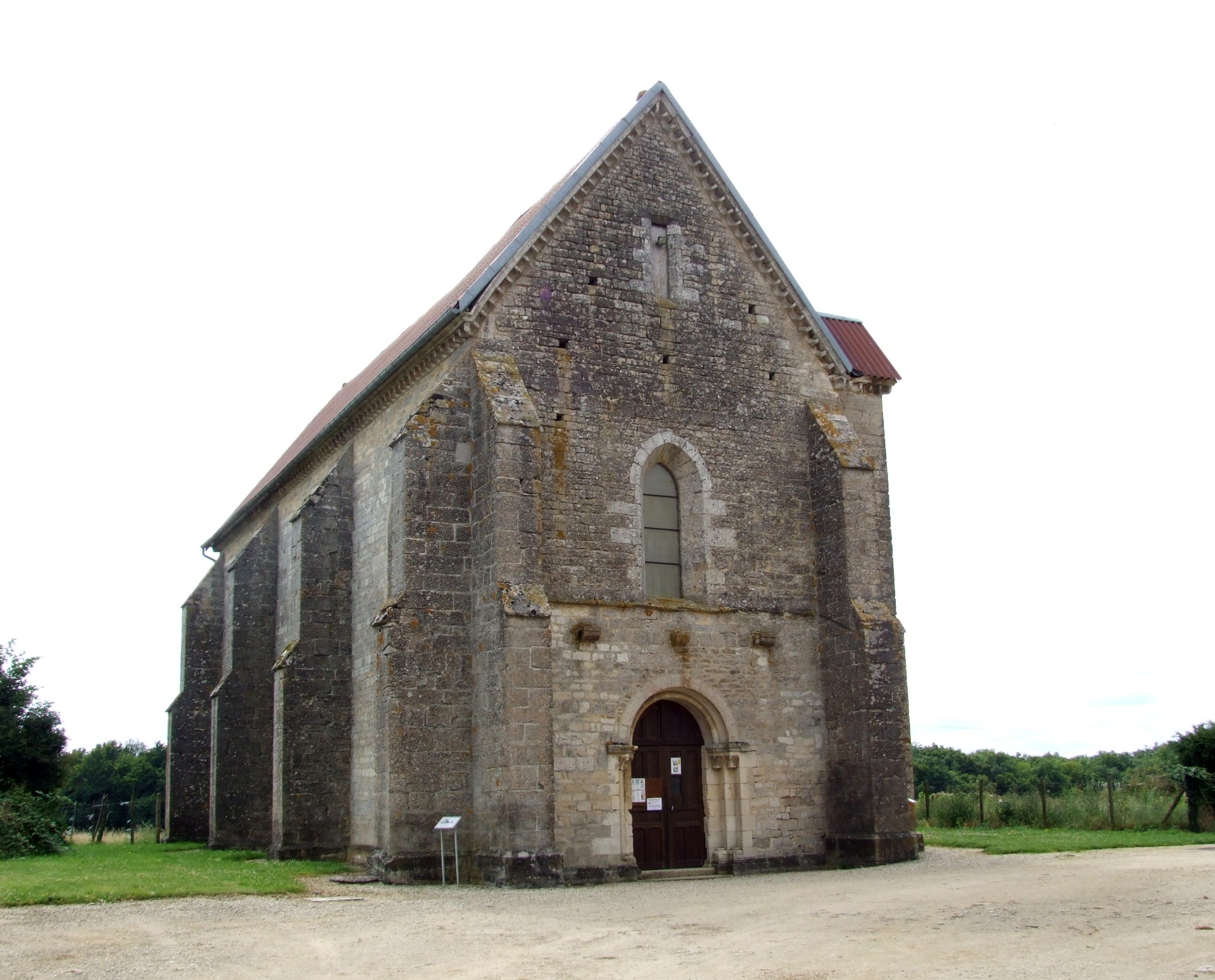 Commanderie d'Avalleur, Bar-sur-Seine, Aube, Champagne-Ardennes, FRANCE